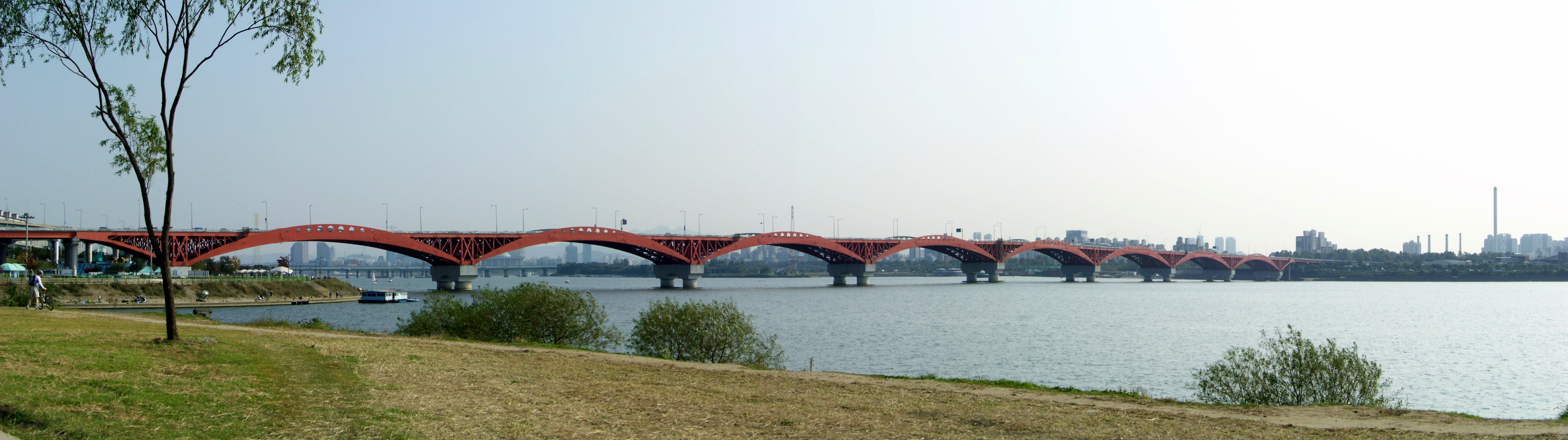 Seongsan Bridge